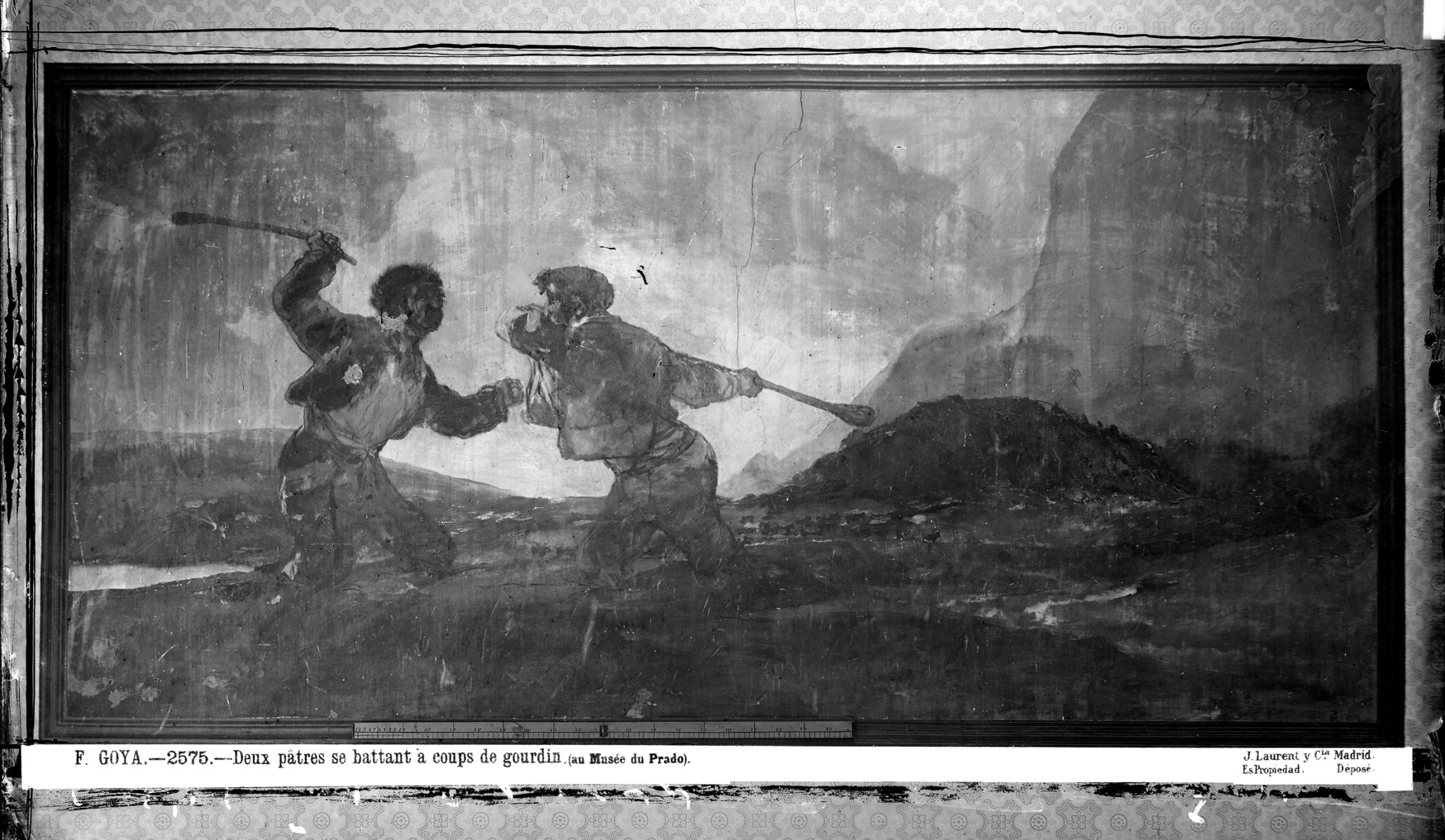 Fotografía de Juan Laurent (1863-1866) del Duelo a garrotazos de Francisco de Goya.